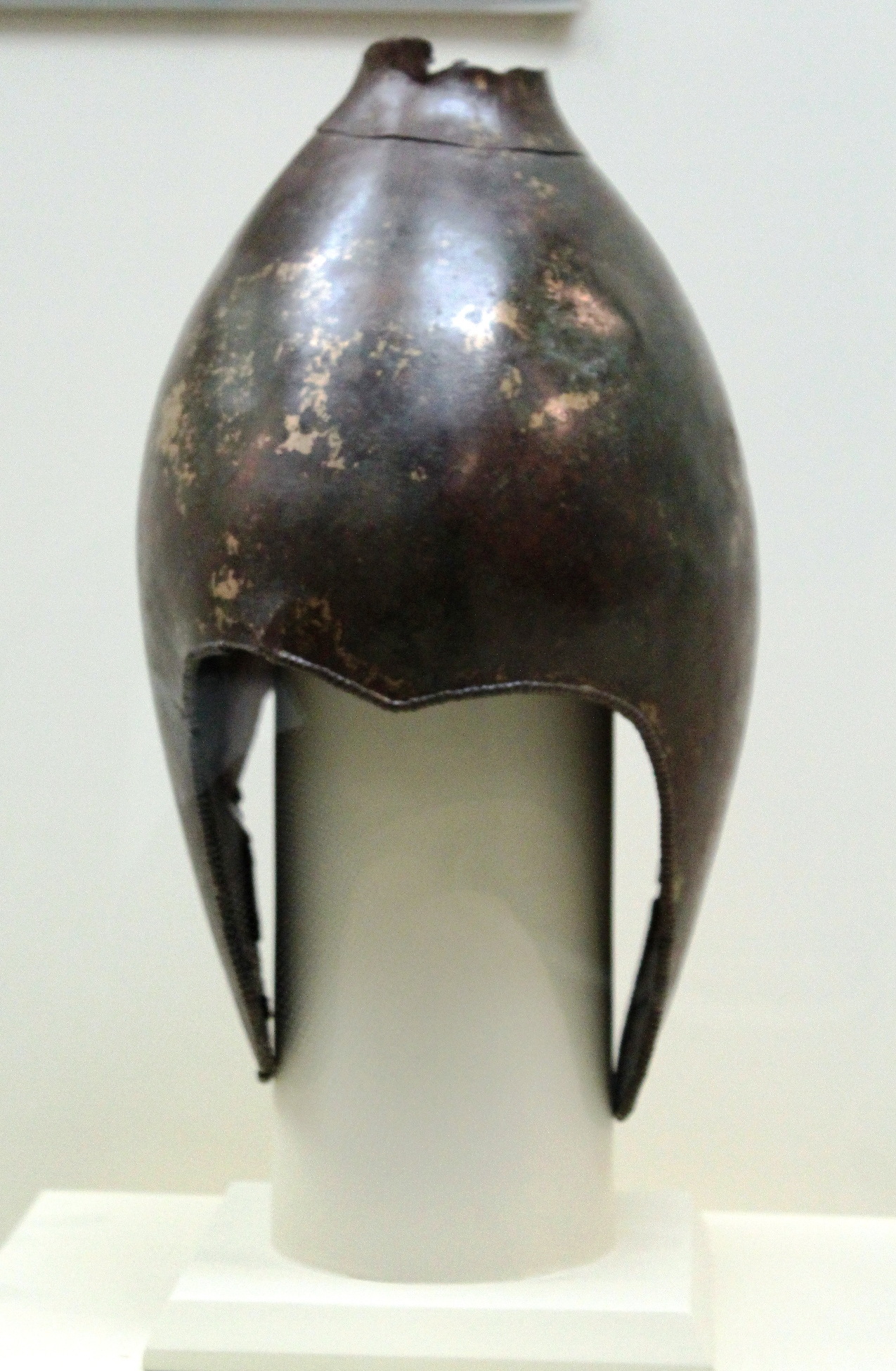 Албанский шлем найденный в ходе археологических раскопок.